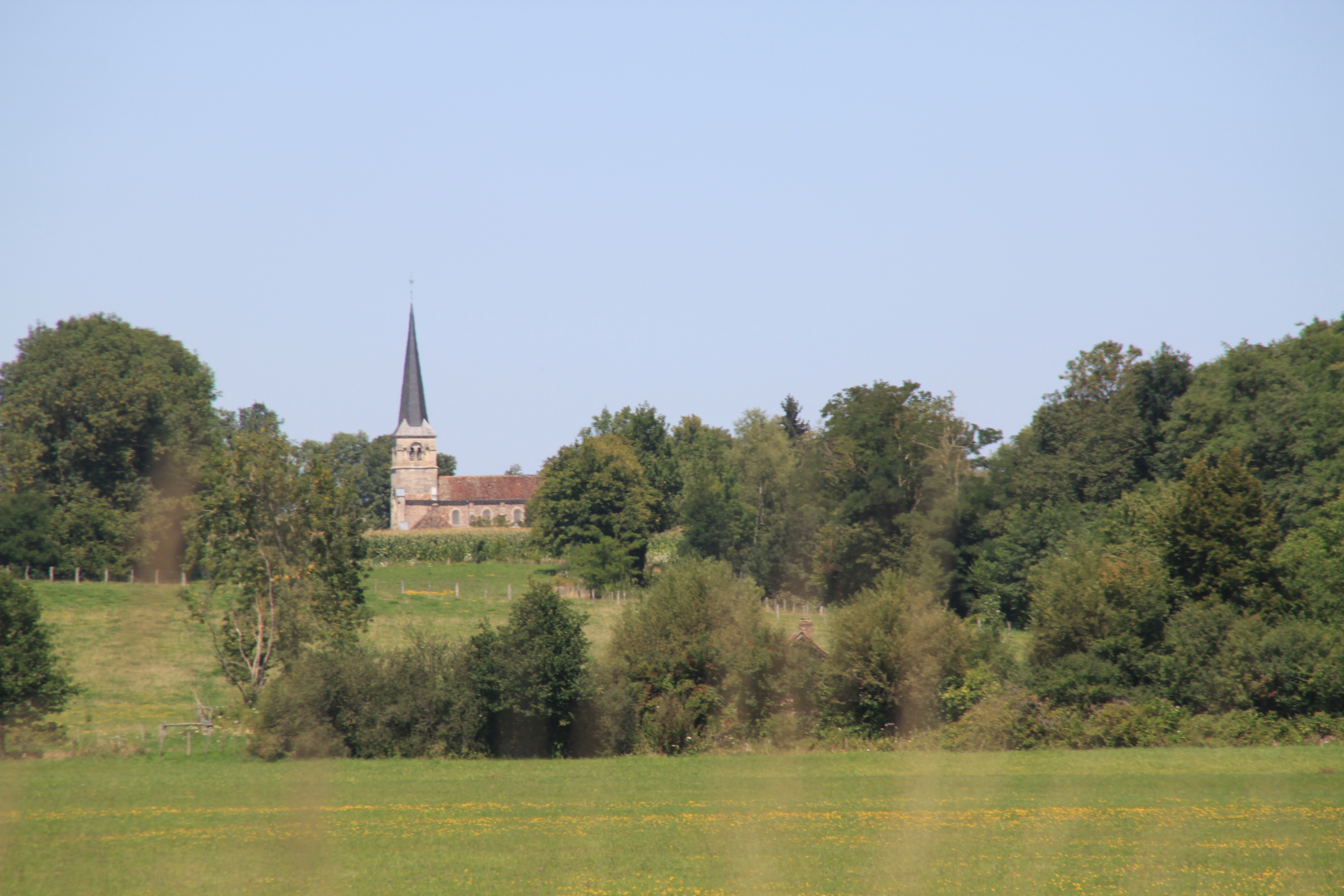 Torpes (Saône-et-Loire) Kirche über das Tal der Brenne